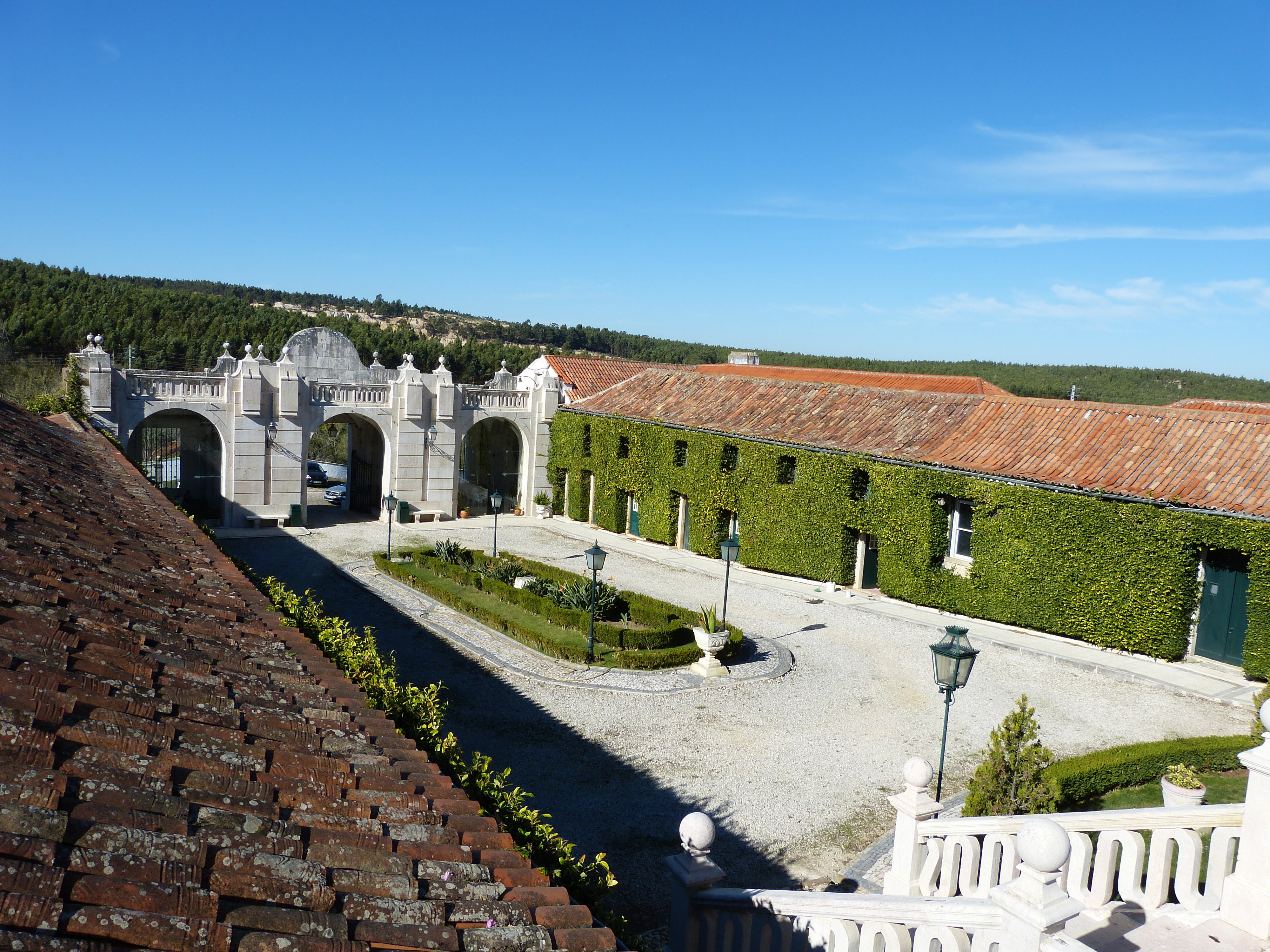 Pátio quadrangular e vista interior da arcada - 2018